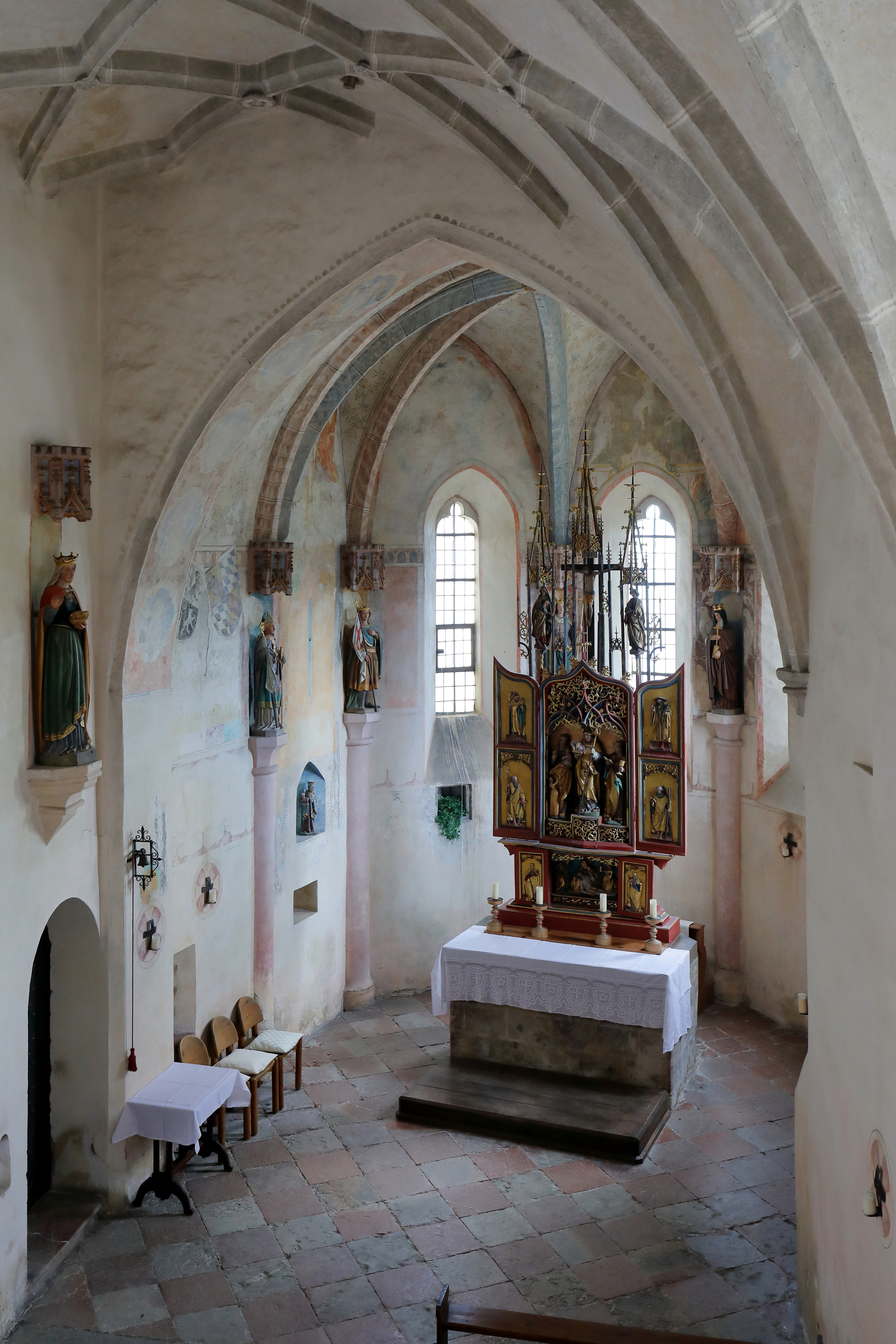 Die aus 13. Jahrhundert stammende Elisabethkapelle bzw. innere Burgkapelle St. Elisabeth in der Burg zu Burghausen in der deutschen Herzogstadt Burghausen im oberbayerischen Landkreis Altötting.